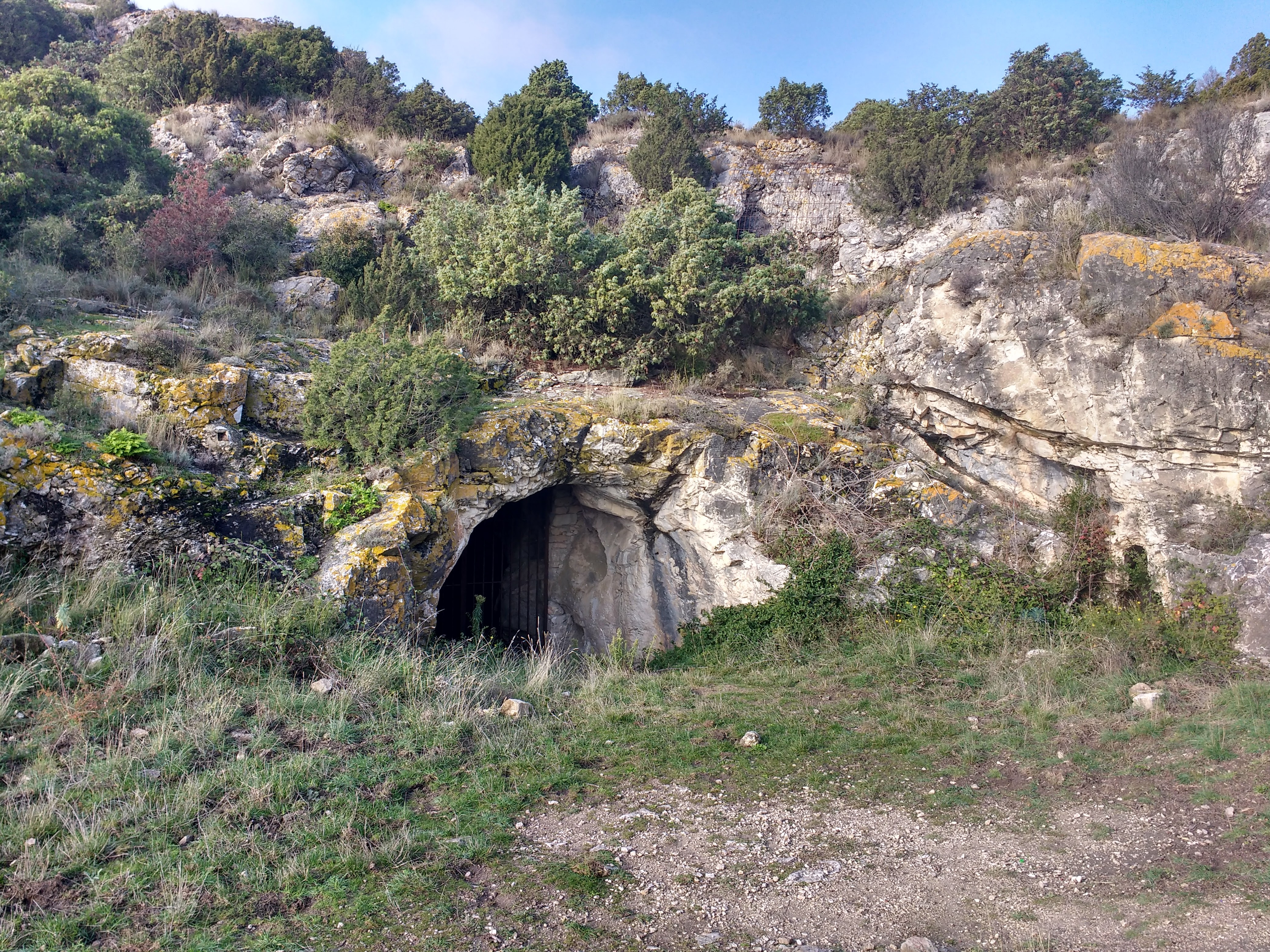 Cauna de Bélesta